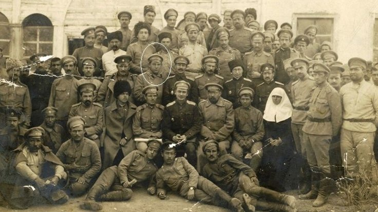 18 Ekim 1917 tarihinde toplanan 4. ve 5. Kafkas Ordusu Birliği Askeri Birlik Temsilcileri Kongresi'ne katılan Rus bir subayın arşivinden Erzincan Sovyeti döneminde çektirilen fotoğraf. Daire içine alınan söz konusu subaydır.